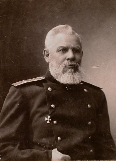 Командир 2-й бригады 4-й Восточно-Сибирской стрелковой дивизии, начальник Сцанцайго[у]сского отряда генерал-майор Митрофан Александрович Надеин. Портрет.